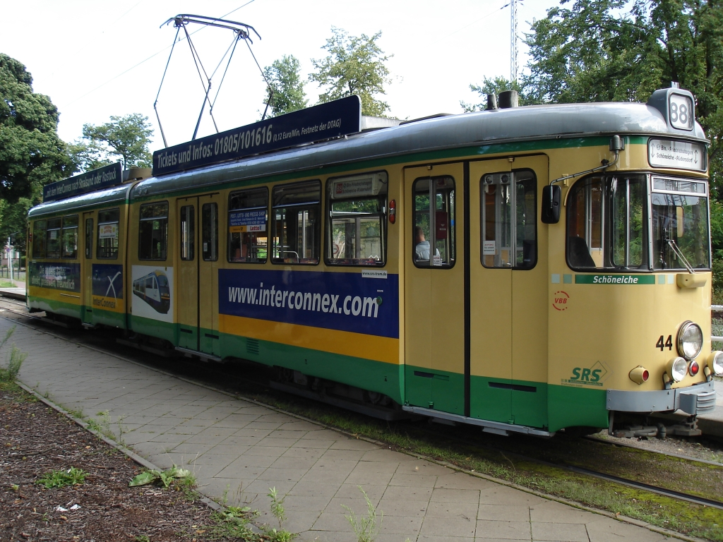 GT6 ex Heidelberg der SRS bei Berlin